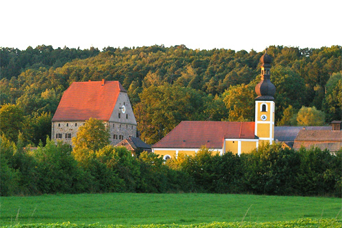 Geschlossene Hofmark Wolfring (Fensterbach, Landkreis Schwandorf, Ostbayern)